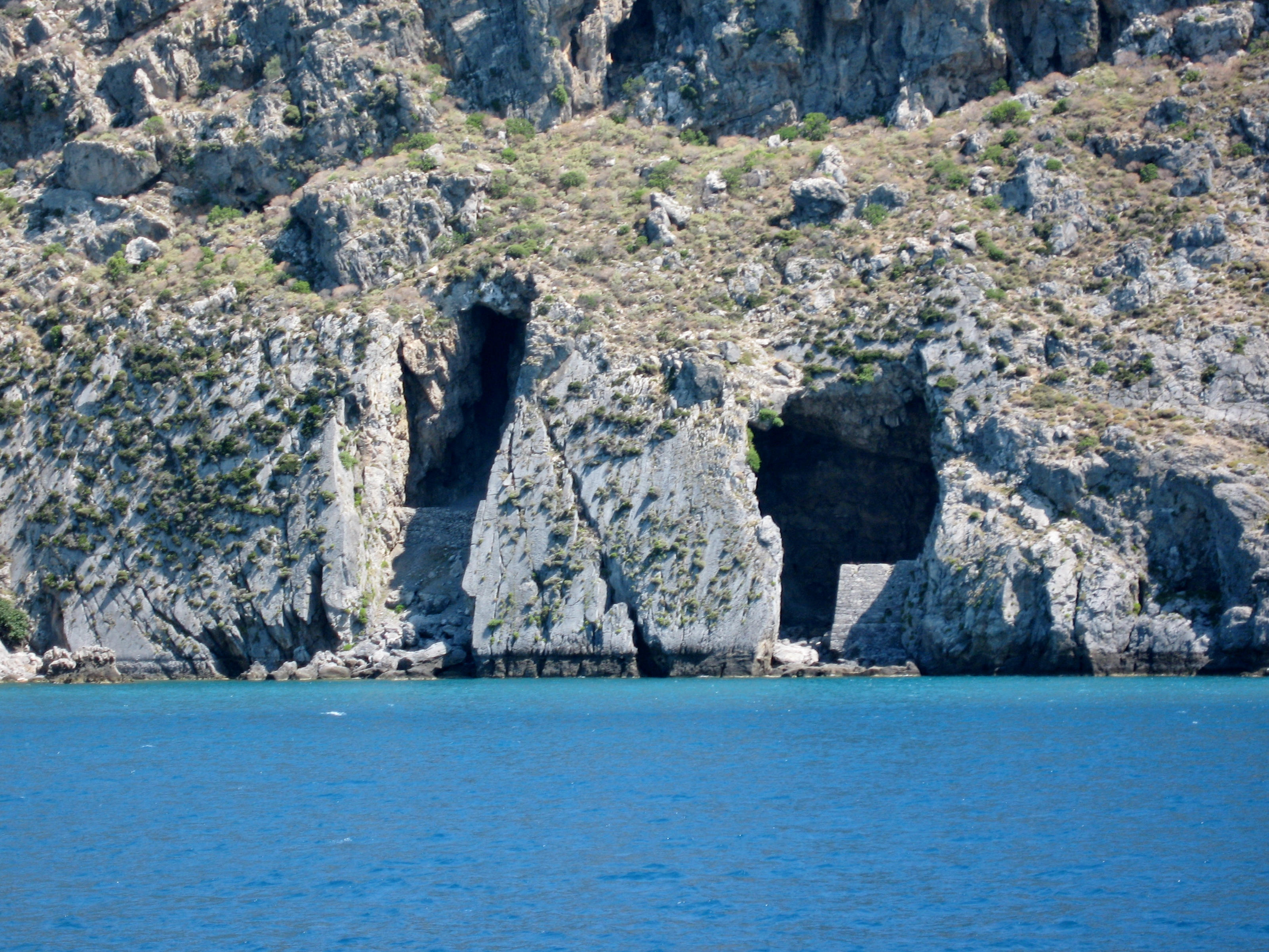 Alte Kohleverladestation an der Bucht von Plakias, Gemeinde Agios Vasilios, Regionalbezirk Rethymno, Kreta, Griechenland